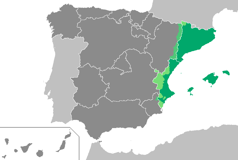 El idioma catalán en España. Territorios catalanoparlantes dónde el catalán es oficial Territorios catalanoparlantes dónde el catalán no es oficial Territorios históricamente no catalanoparlantes dónde el catalán es oficial